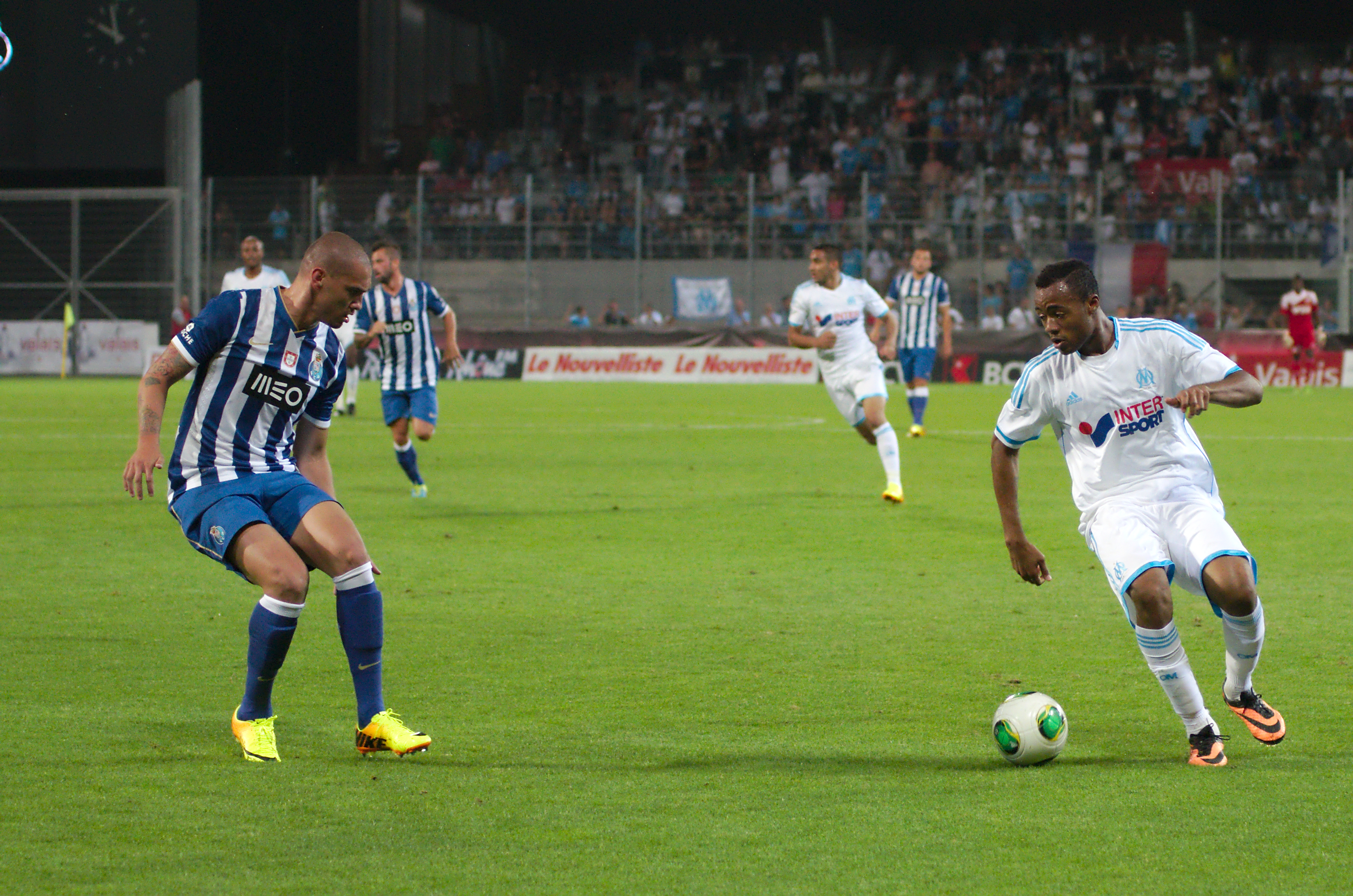 Valais Cup 2013 - OM-FC Porto - 20130713 - Maicon et Jordan Ayew